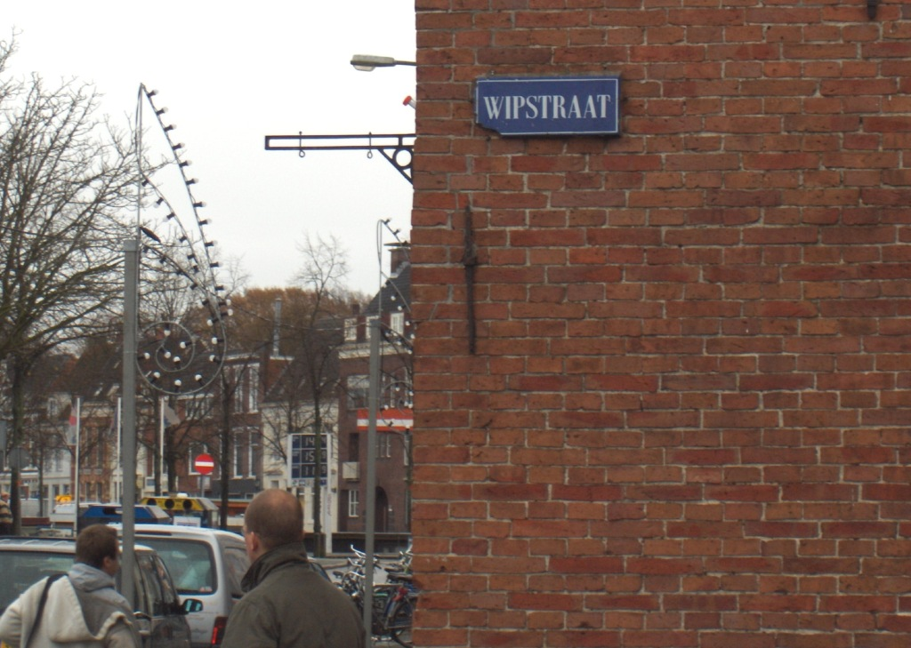 Straatnaambord Wipstraat (Gron)